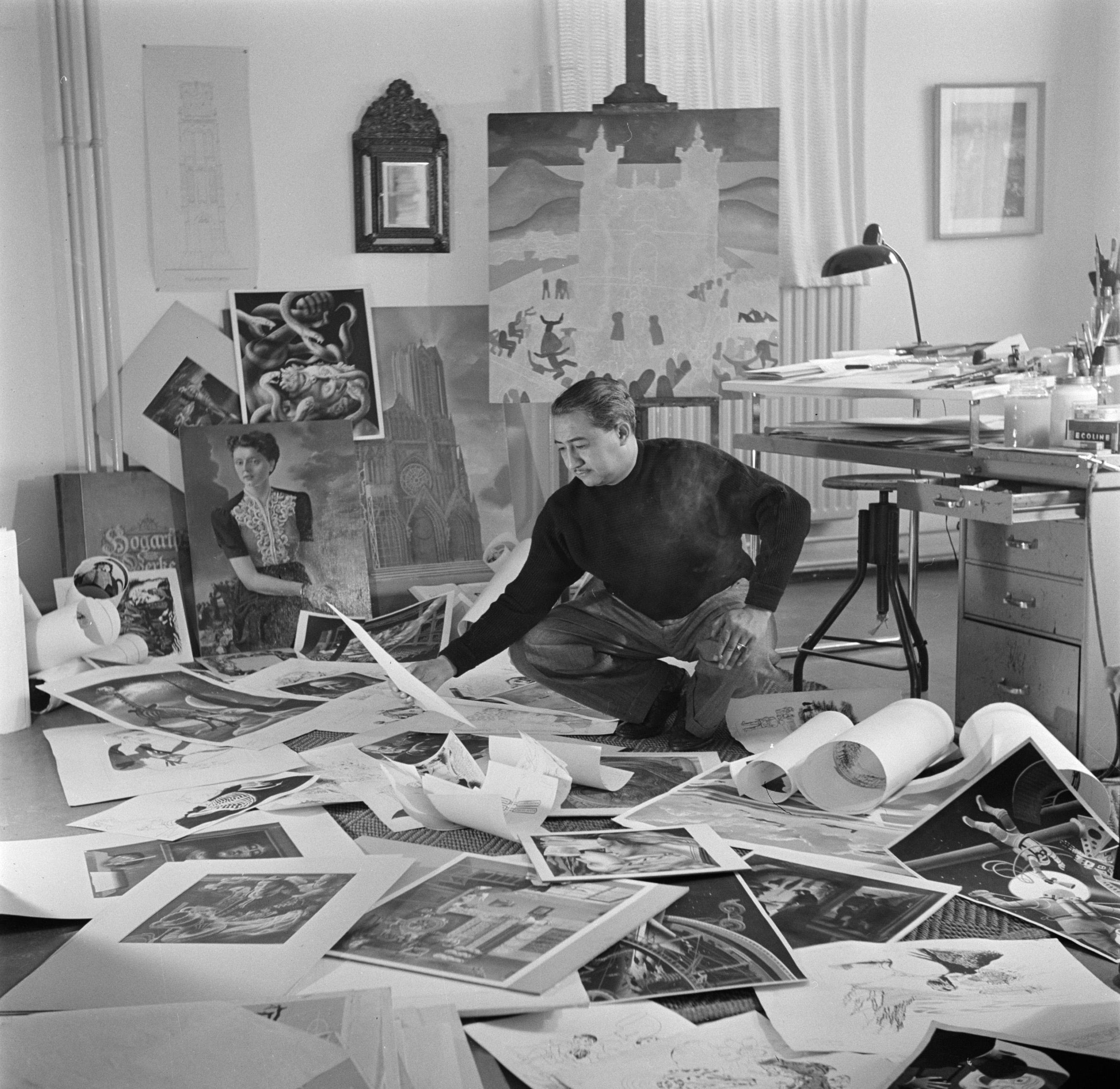 Collectie / Archief : Fotocollectie Van de Poll Reportage / Serie : Reportage Eppo Doeve Beschrijving : De kunstenaar Eppo Doeve in zijn atelier Annotatie : Het atelier van Doeve bevond zich op de Rivierenlaan 197 in Amsterdam. De laan heet nu President Kennedylaan Datum : augustus 1954 Locatie : Amsterdam, Noord-Holland Trefwoorden : ateliers, schilders Persoonsnaam : Doeve, Eppo Fotograaf : Poll, Willem van de, [onbekend] Auteursrechthebbende : Nationaal Archief Materiaalsoort : Negatief (6x6) Nummer archiefinventaris : bekijk toegang 2.24.14.02 Bestanddeelnummer : 254-2926